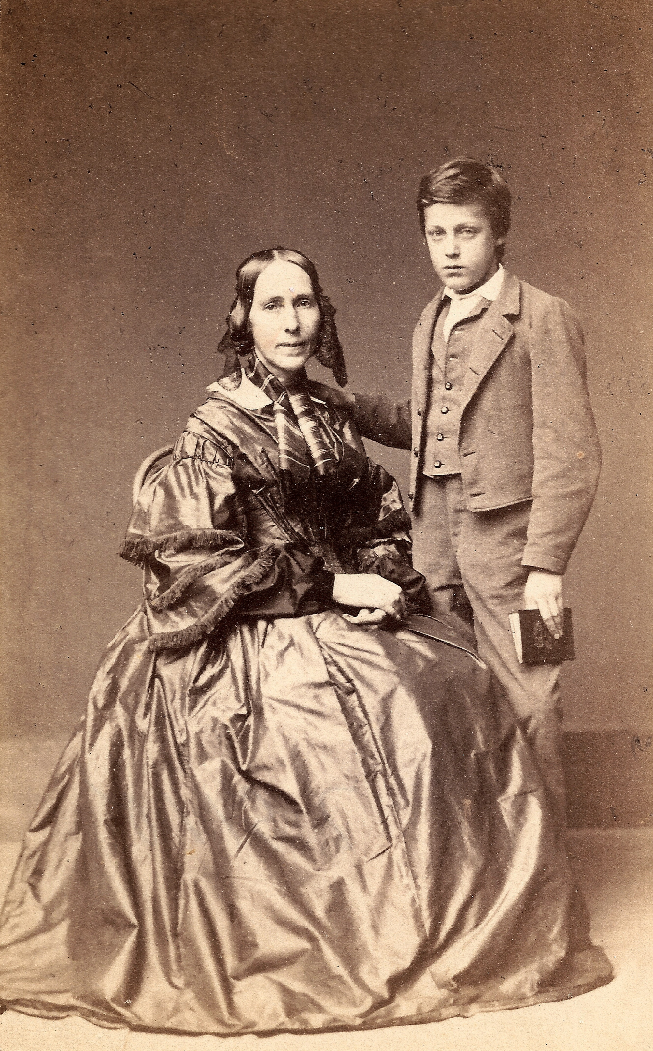 Elise Conradi Tochter von Leopold Conradi, verheiratet mit Johannes Mährlen, auf einer Carte de Visite abgebildet mit einem ihrer Söhn, Albuminpapier